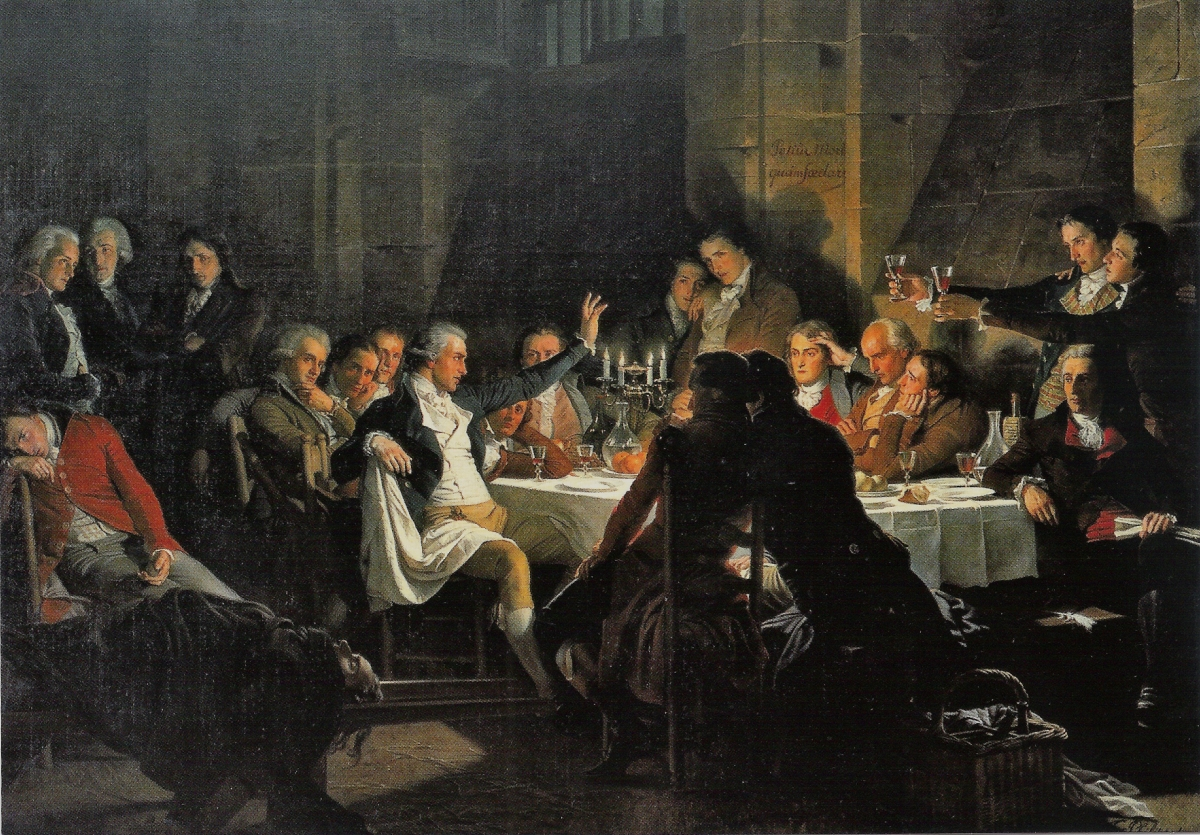 Au premier plan à gauche est étendu sur une civière le corps sans vie de Charles Éléonor Dufriche-Valazé qui s'était poignardé dans la salle d'audience du Tribunal révolutionnaire à l'énoncé de la condamnation à mort. Il existe de cet événement légendaire plusieurs interprétations dont celle peinte par François Flameng (1856-1923), intitulée L'Appel des Girondins, le 30 octobre 1793 ou Le Dernier Repas des Girondins, interrompu par l’appel pour la guillotine, 31 octobre 1793